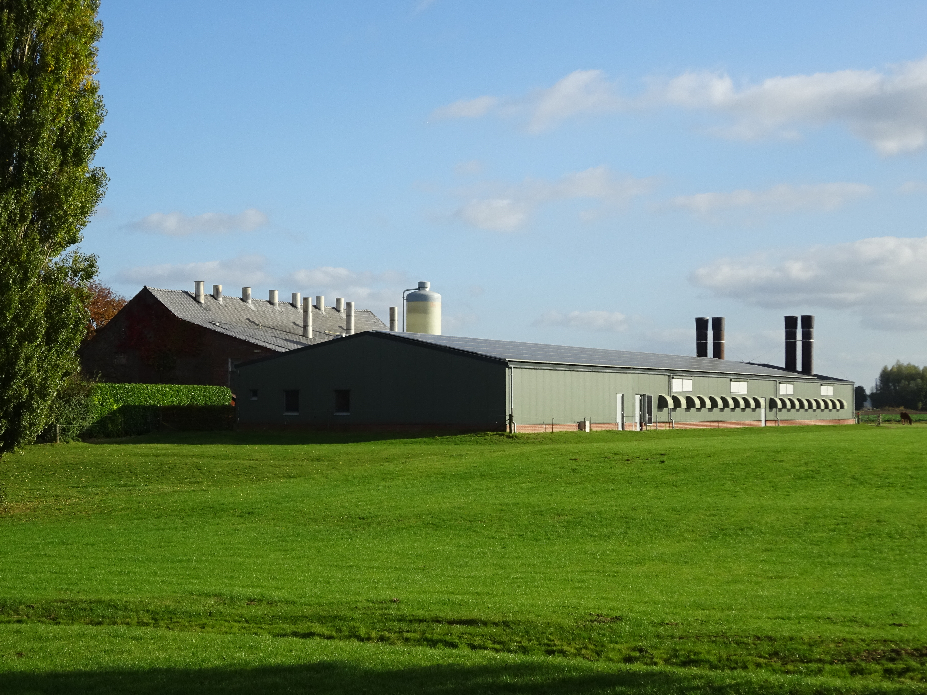 Kalkar-Bylerward, Eyland 27, Kifwardshof, eierproductie, op de voorgrond: Emmericher-Eyland-Graben